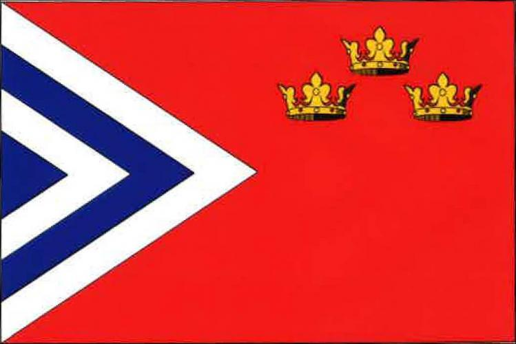 vlajka, Stanovice, okres Karlovy Vary